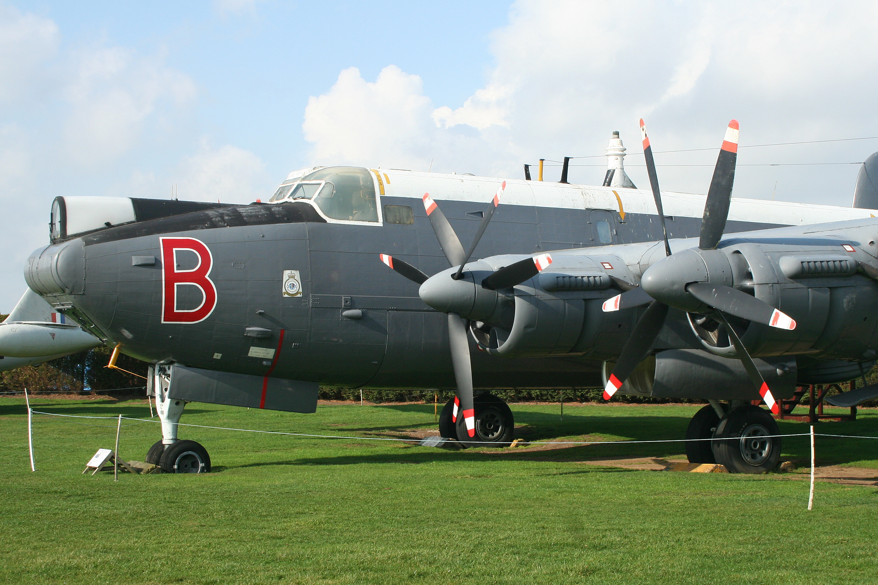 Newark Air Museum. 03-03-2012